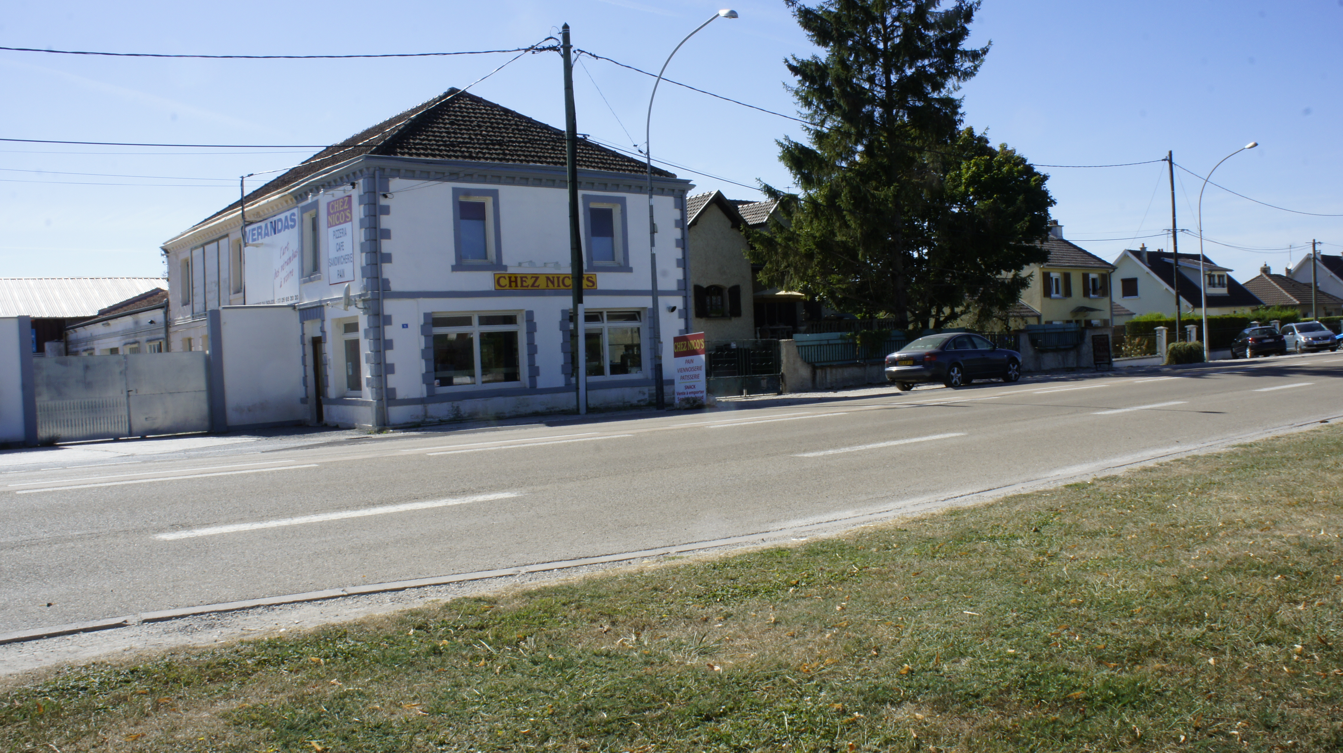 Commerce sur la départementale 3 .